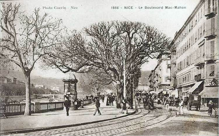 Le boulevard vers 1900, même direction.